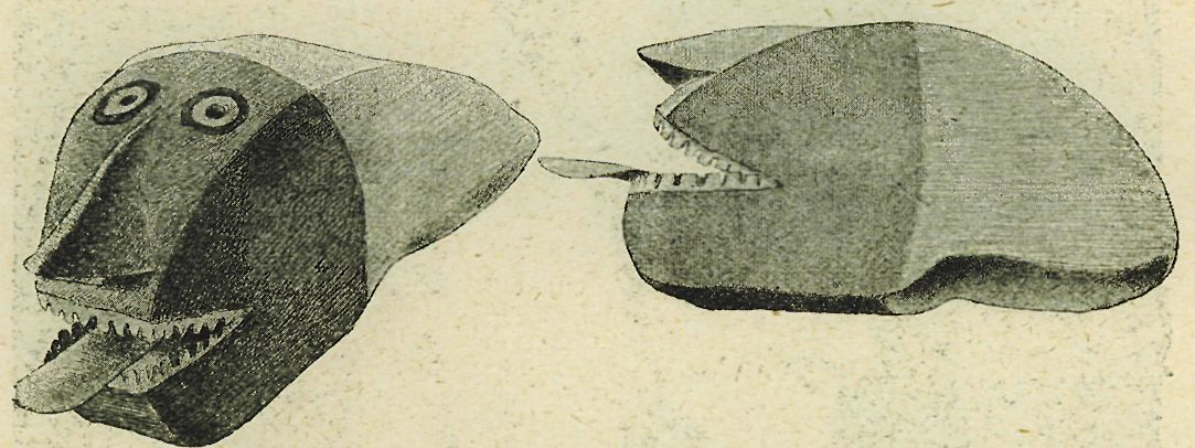 Маски Перучты (Перхты, cs. Peruchty; en. Perchta)